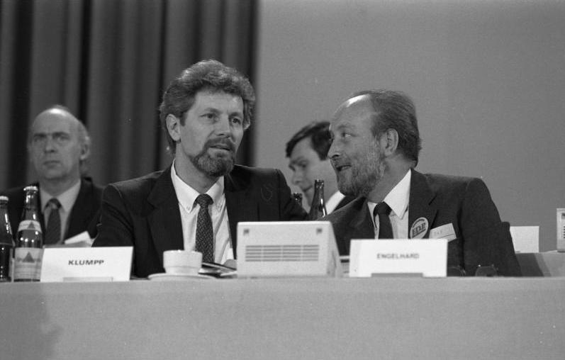 29.-30.01.1983 Außerordentlicher Bundesparteitag der FDP in der Stadthalle Freiburg.